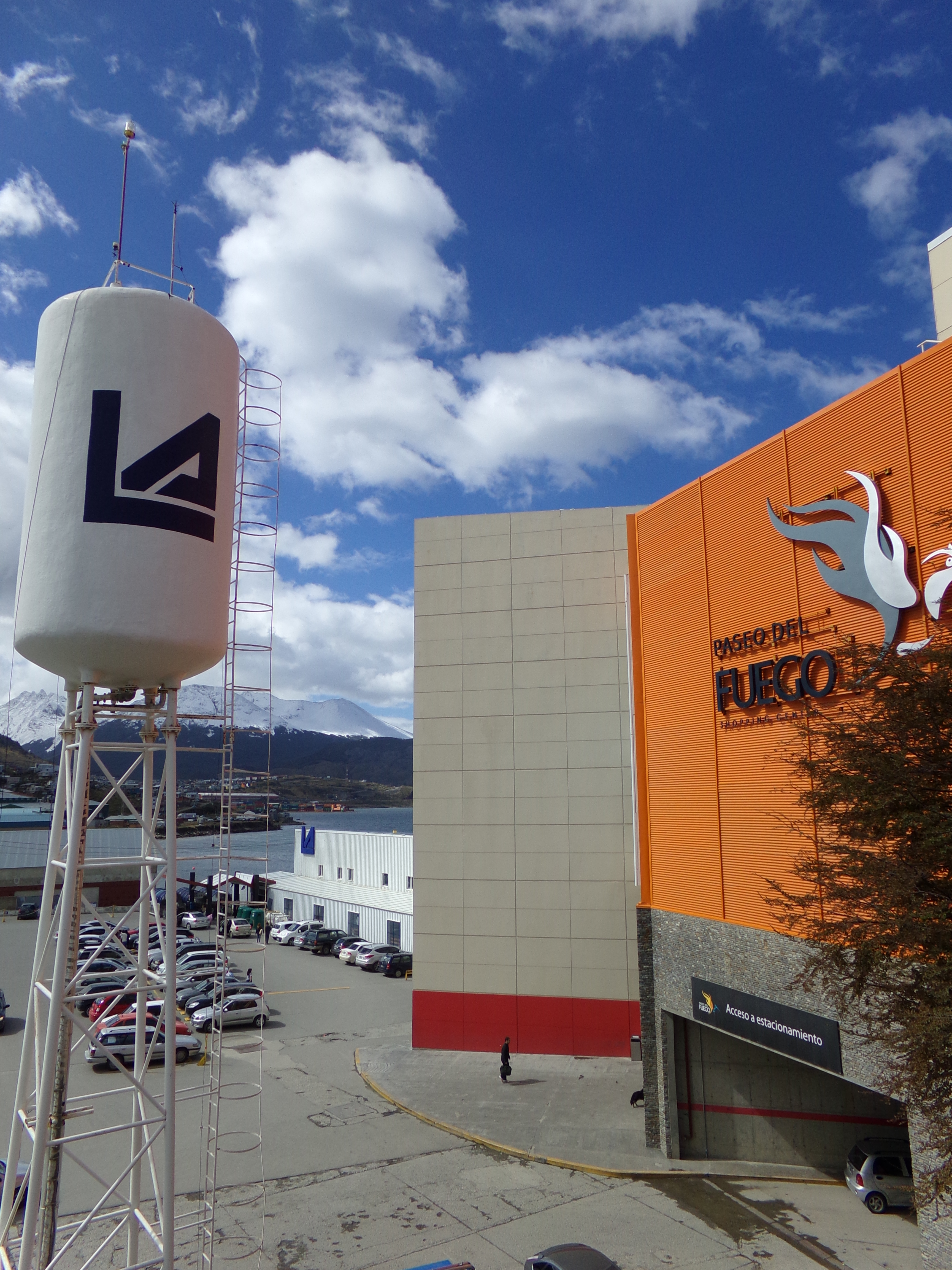 La Anónima y Paseo del Fuego, Ushuaia